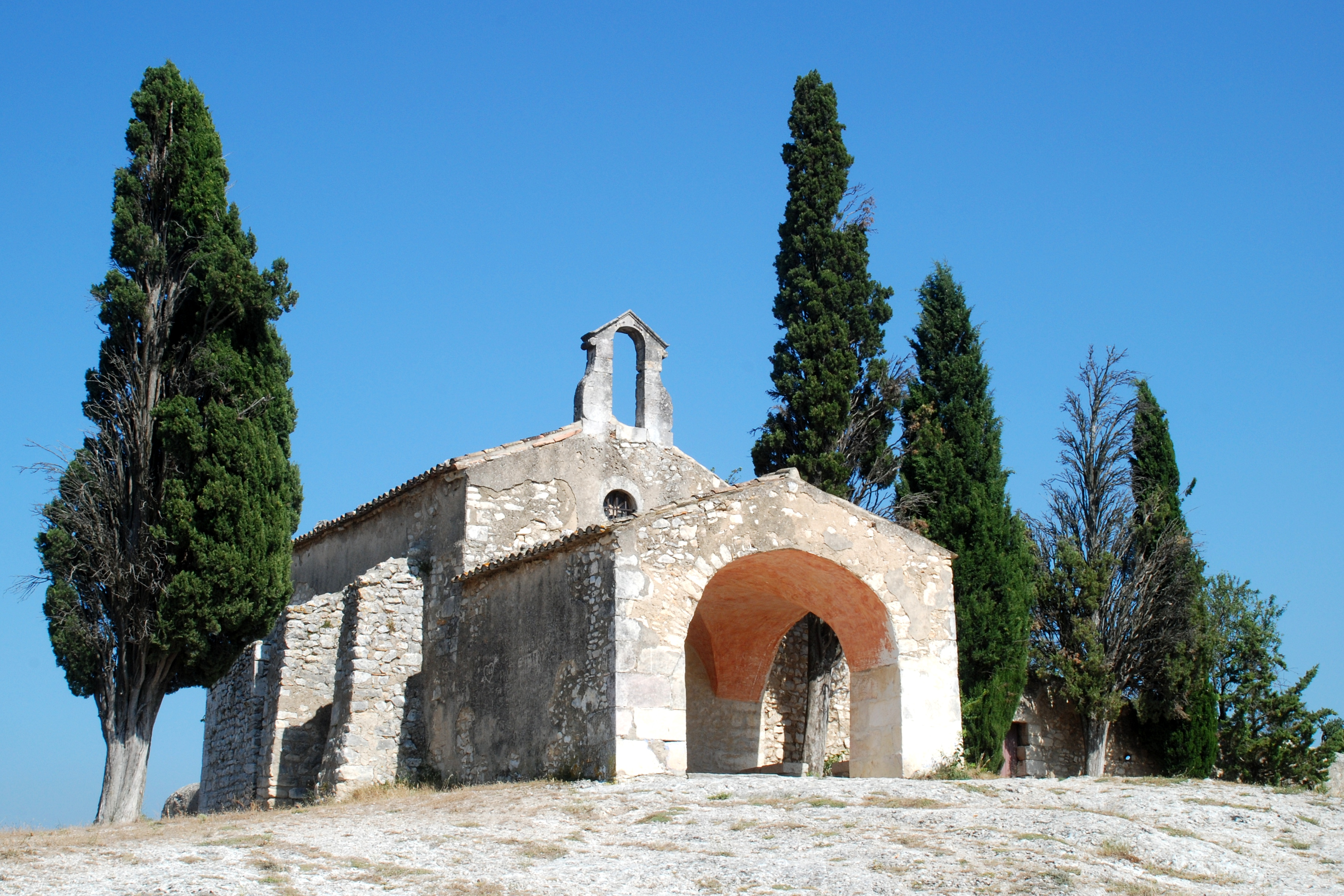 France - Provence - Bouches-du-Rhône - Chapelle Saint-Sixte d'Eygalières